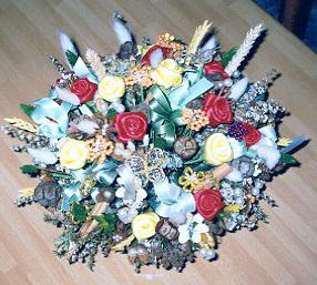 Composizione di Biedermeier fatta da Rinina25